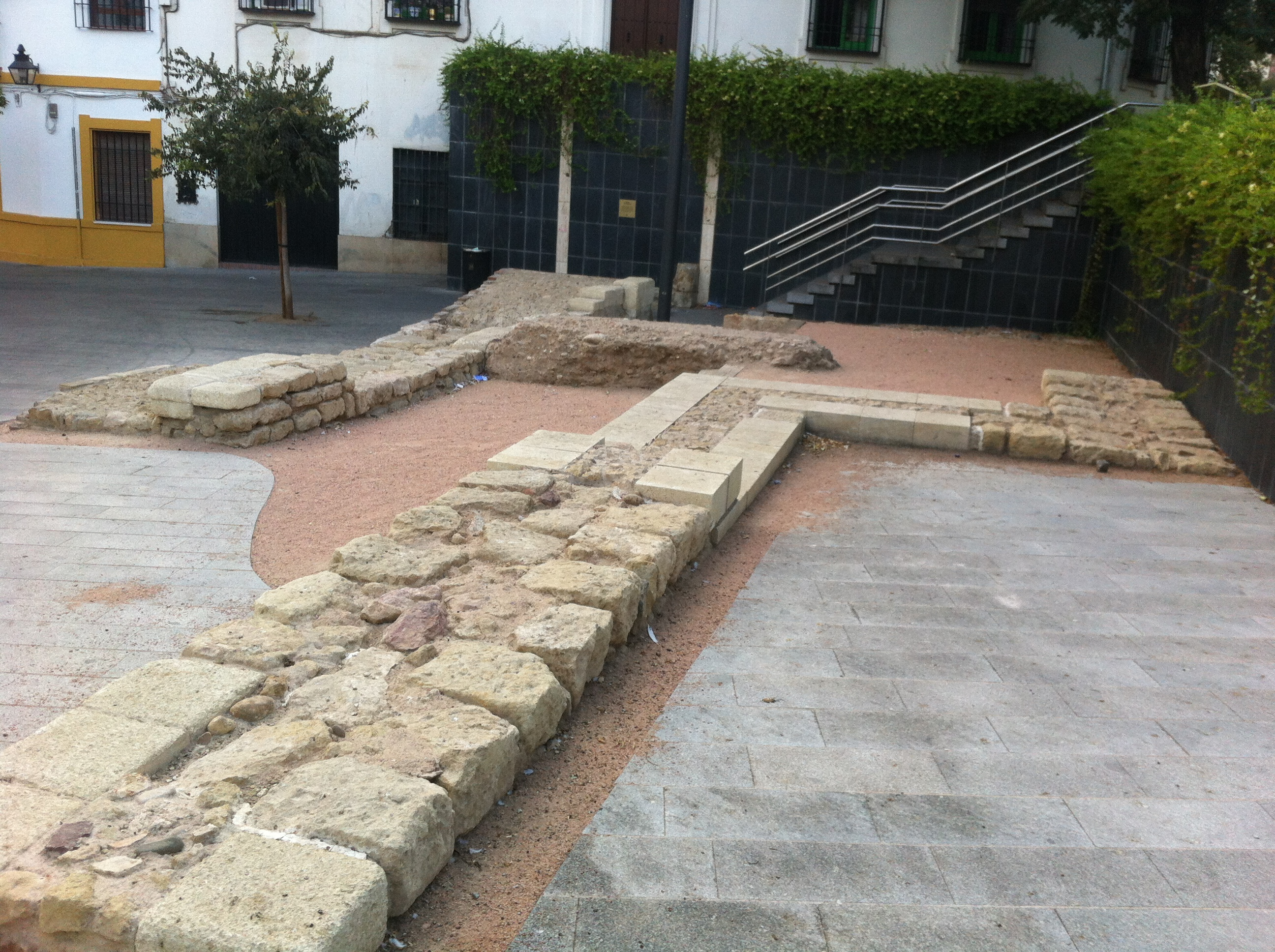 Puerta de muralla urbana en Córdoba.